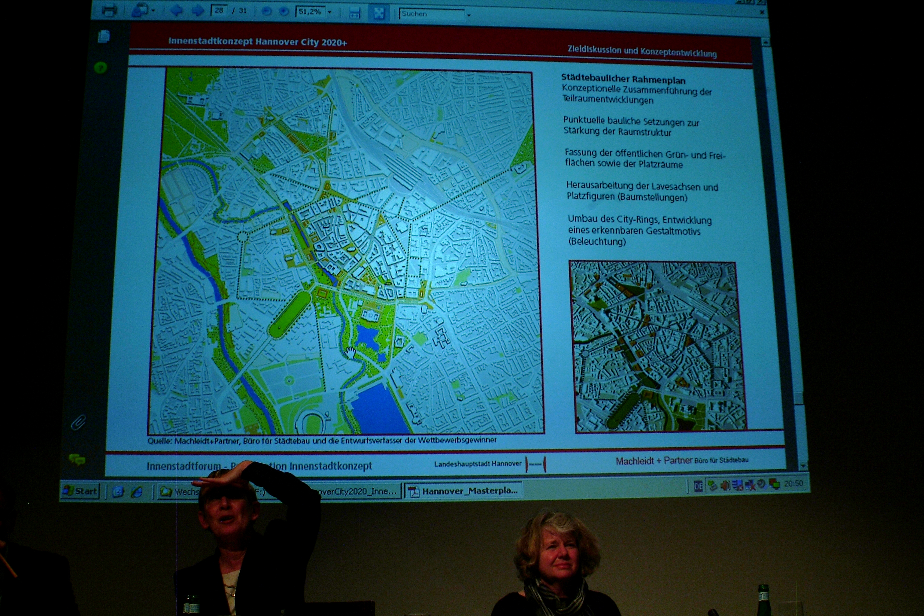 Präsentation des Entwicklungsstandes der bisherigen Ergebnisse hinsichtlich der innerstädtischen Umbauplanungen Hannover City 2020 + am 12. Dezember 2010 im Sprengel Museum Hannover. Im Podium (in der Reihenfolge der Vorträge): Stadtbaurat Uwe Bodemann, Brigitte Holz (Freischlad + Holz), Professor Michael Braum (Bundesstiftung Baukultur), Juliane Schonauer (Machleidt + Partner), Professor Rolf Wernstedt